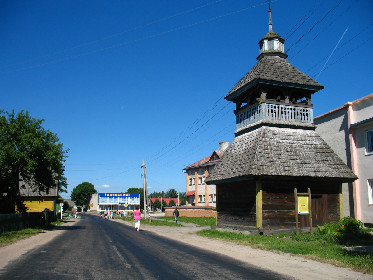 Беларуская (тарашкевіца): Званіца ў Шарашове